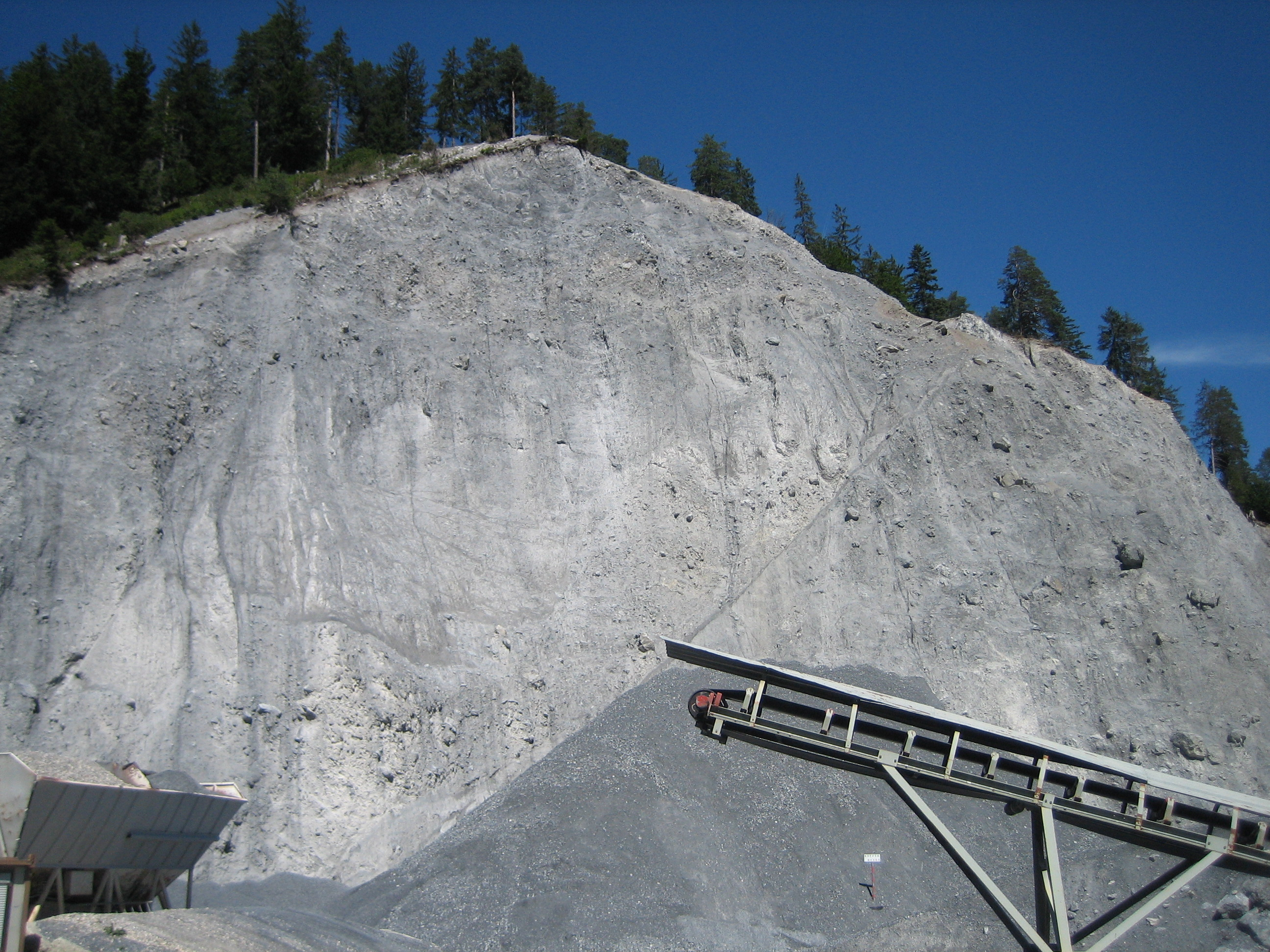 Kieswerk bei Versam; Ausbeutung der Schuttmasse des Flimser Bergsturzes